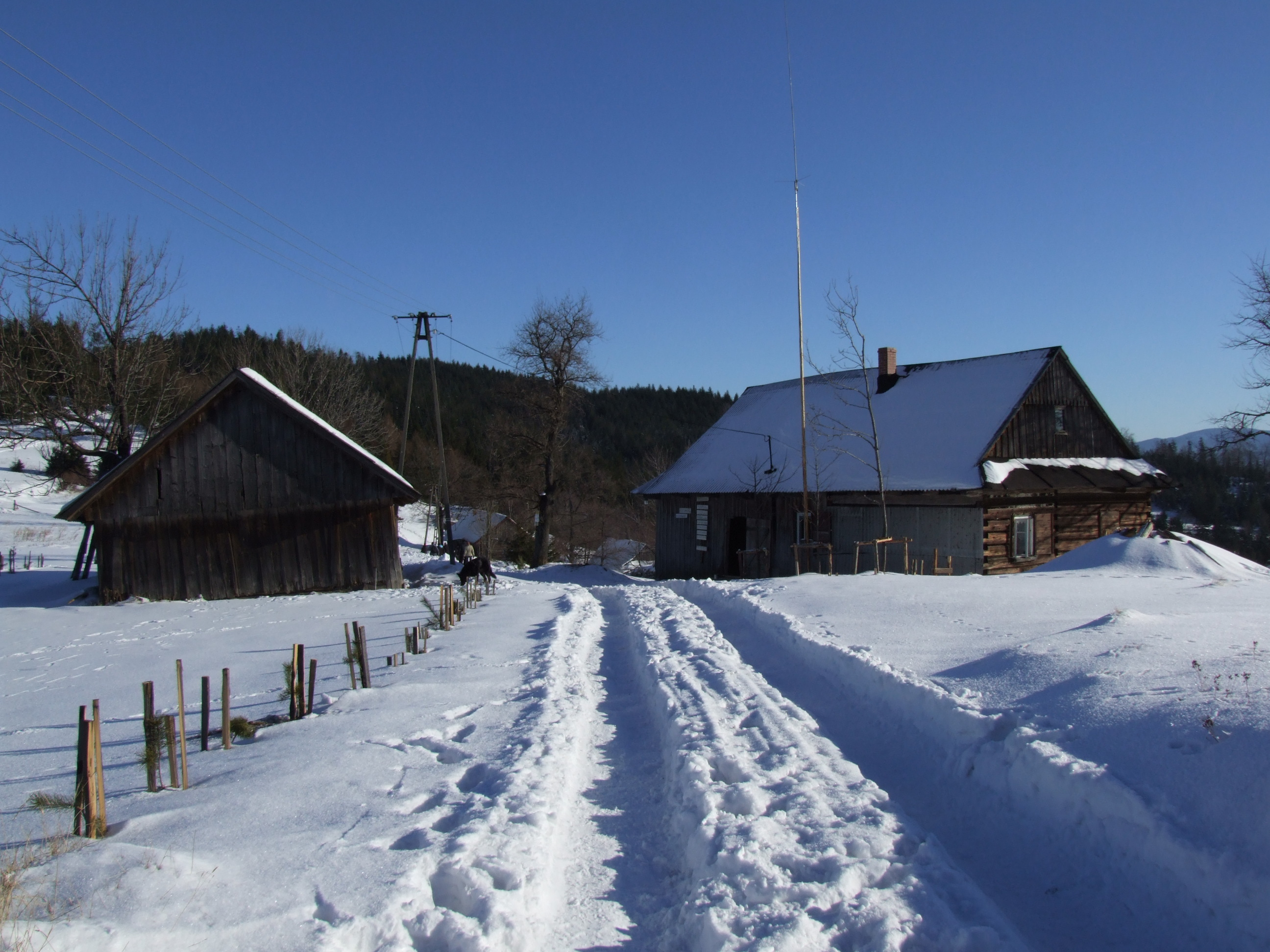 Przysiółek Gibasy (chatka Gibasówka) zimą